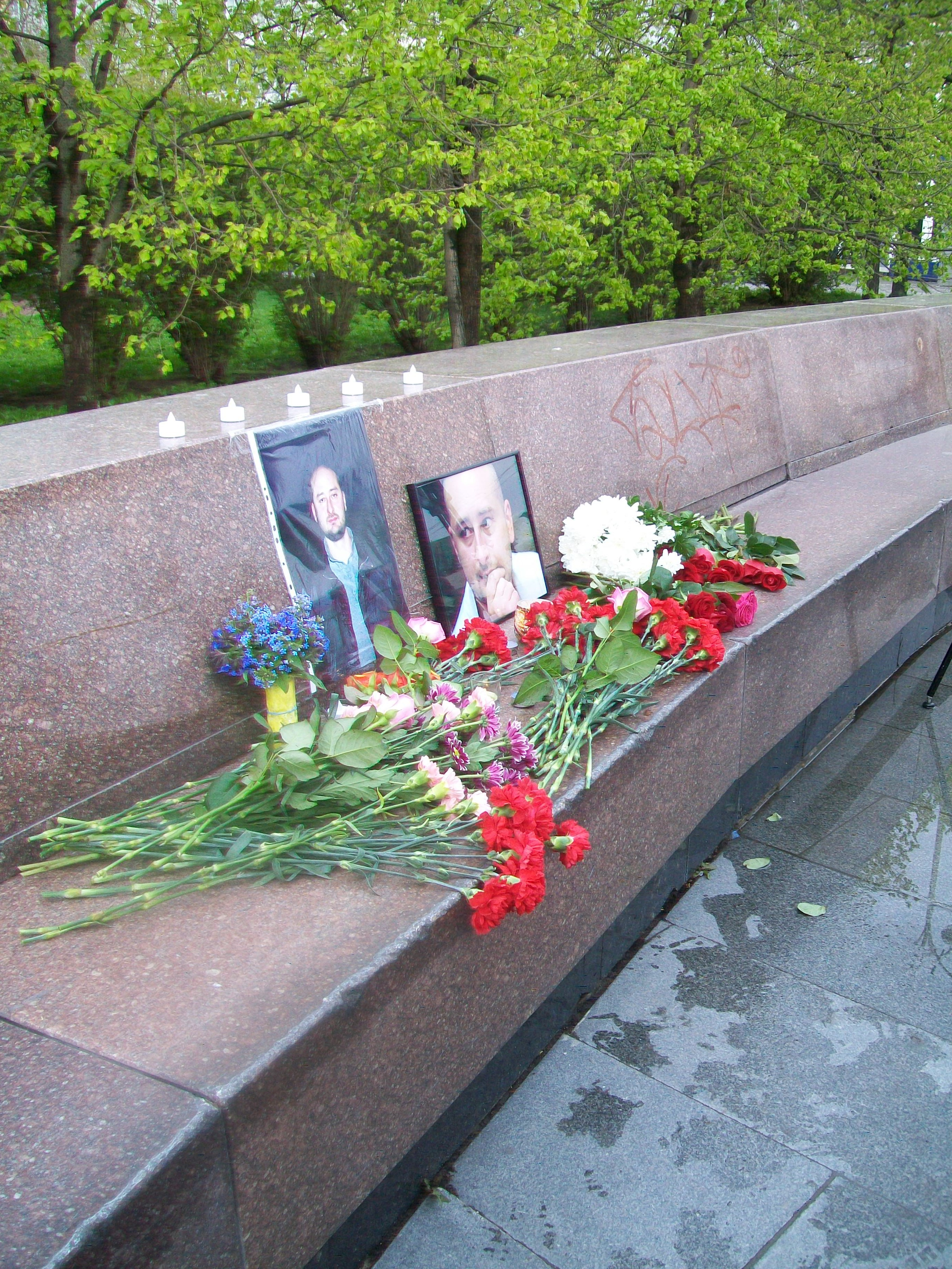 Импровизированный мемориал в память об якобы убитом журналисте Аркадии Бабченко в Екатеринбурге. Место поминовения Бабченко на площади Труда. 30 мая 2018 года